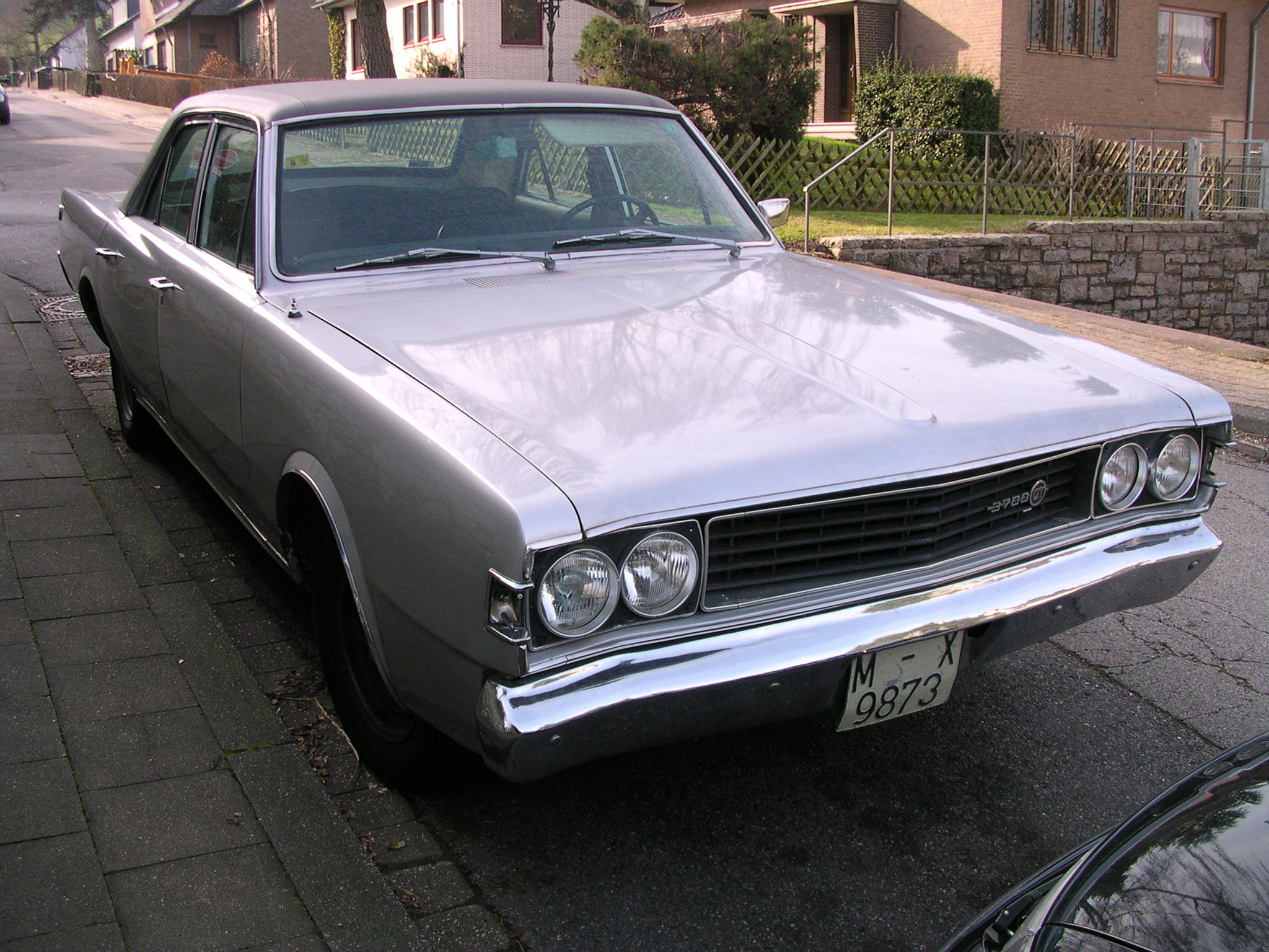 Dodge, dürfte wohl ein 3700 GT sein, das spanische Schwestermodell vom Dart.